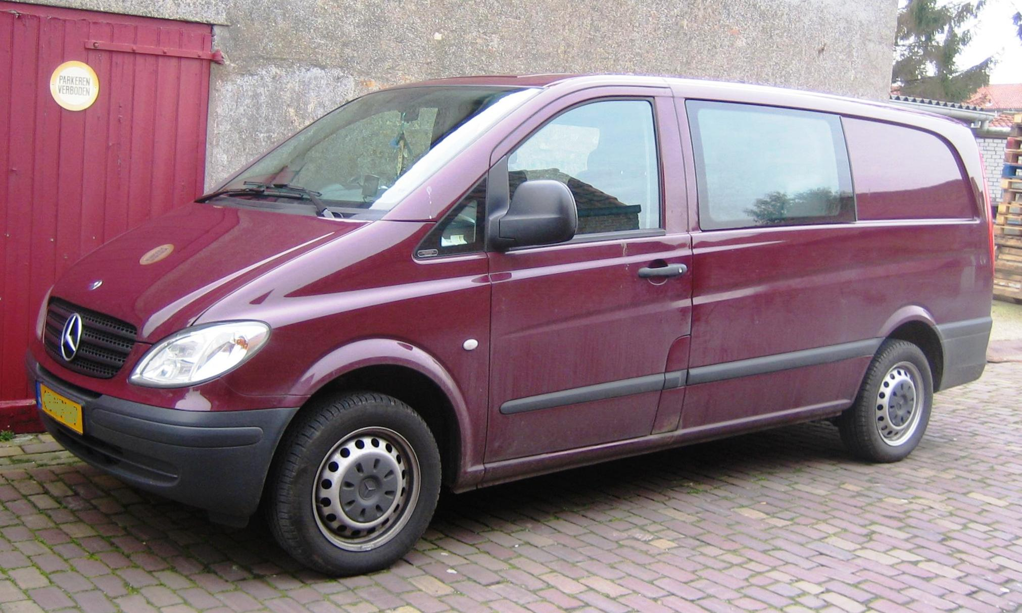 Mercedes-Benz Vito second iteration